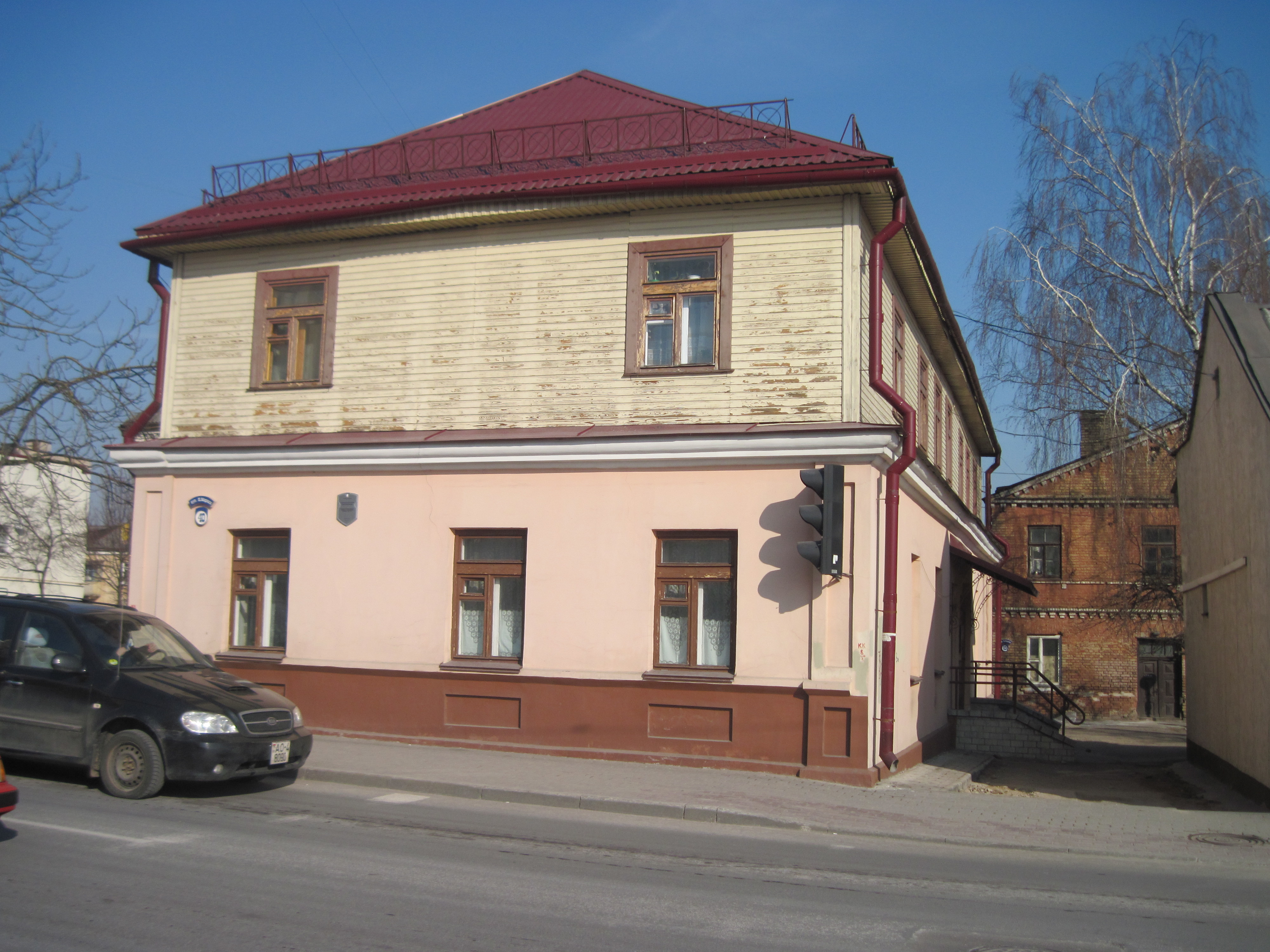 Забудова гістарычнага цэнтра Гродна. Вуліца К. Маркса, 40